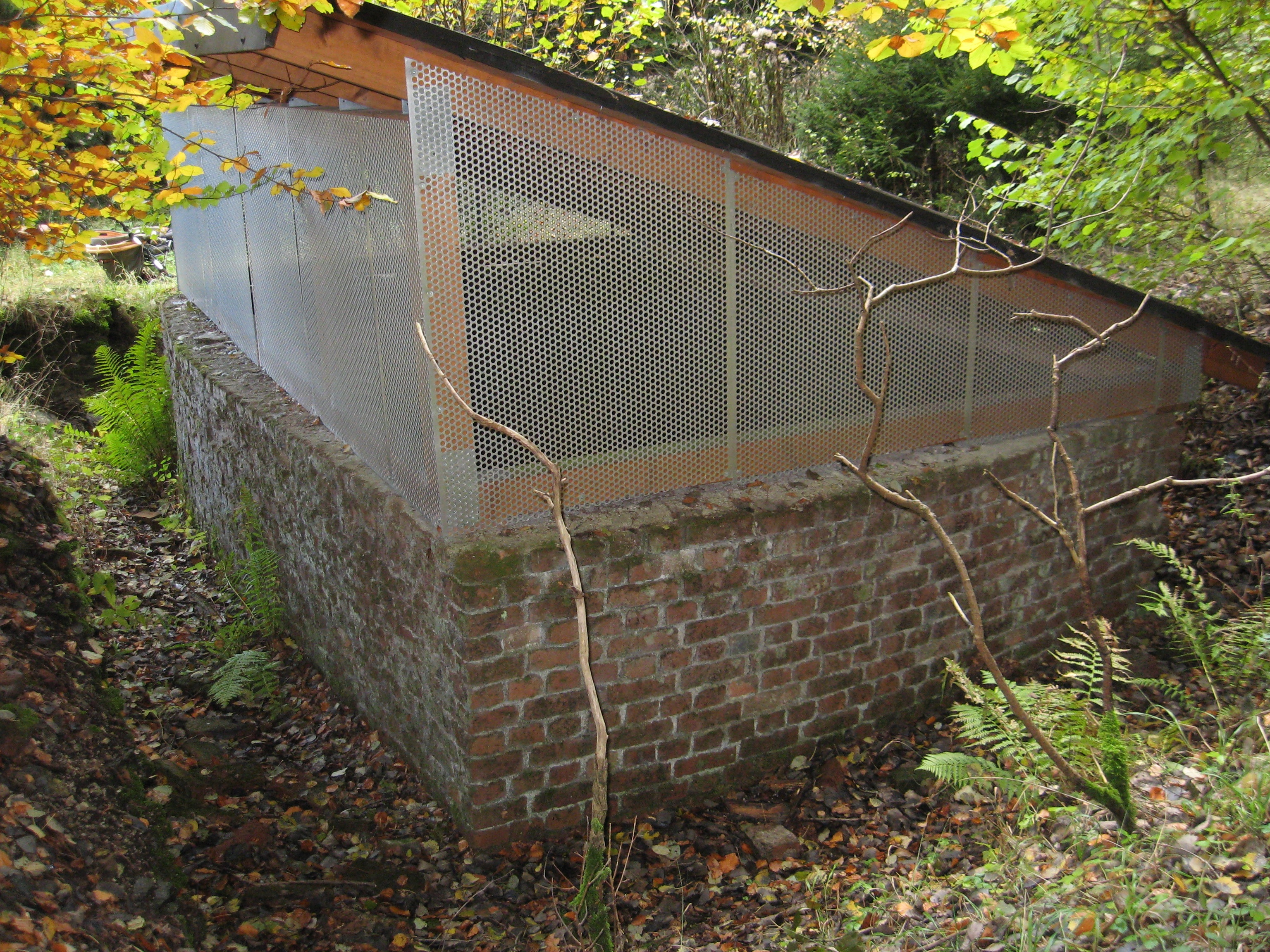 Standort des Schachtes der Grube Arbacher Einigkeit.